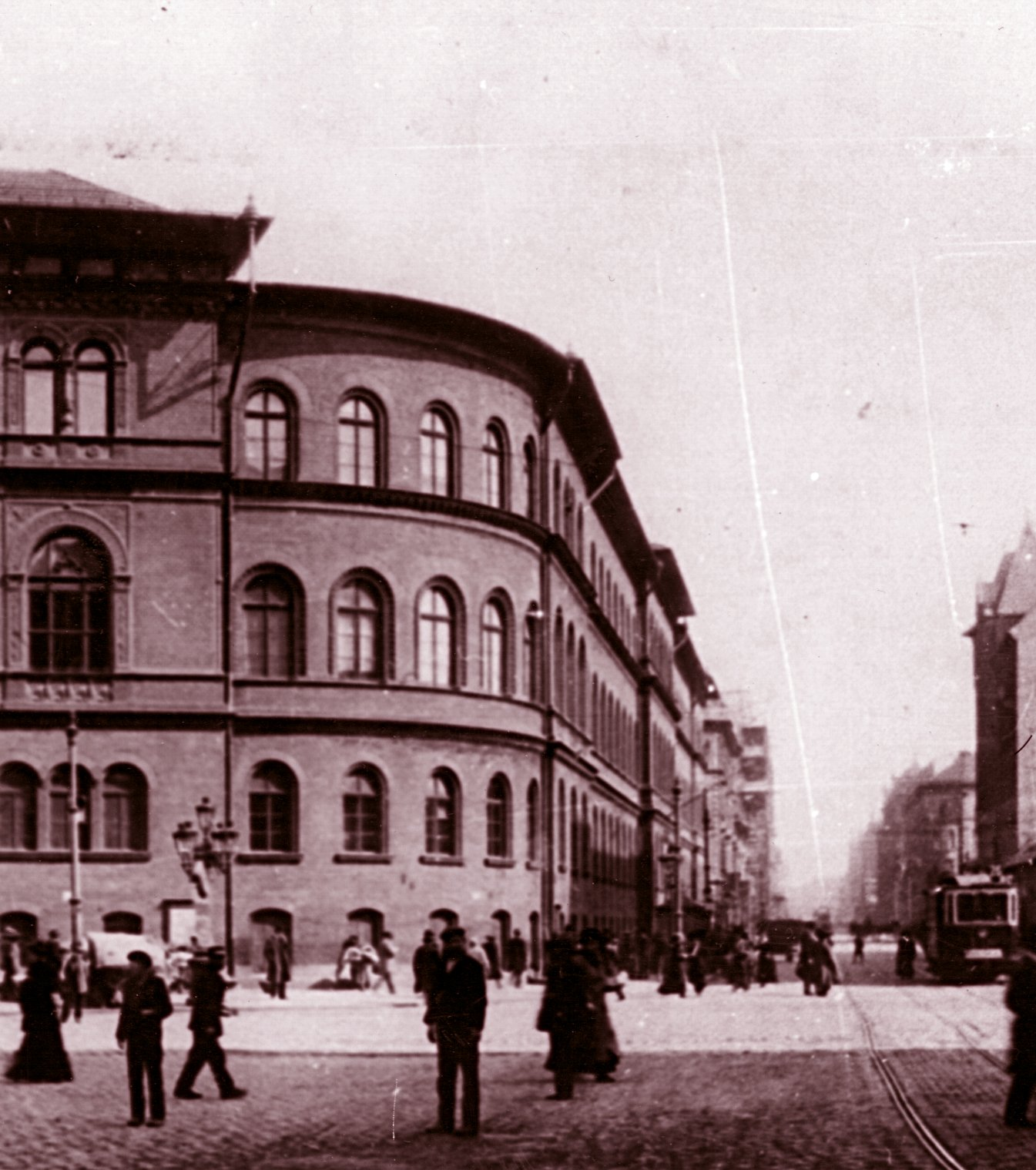 Bánki Donát College